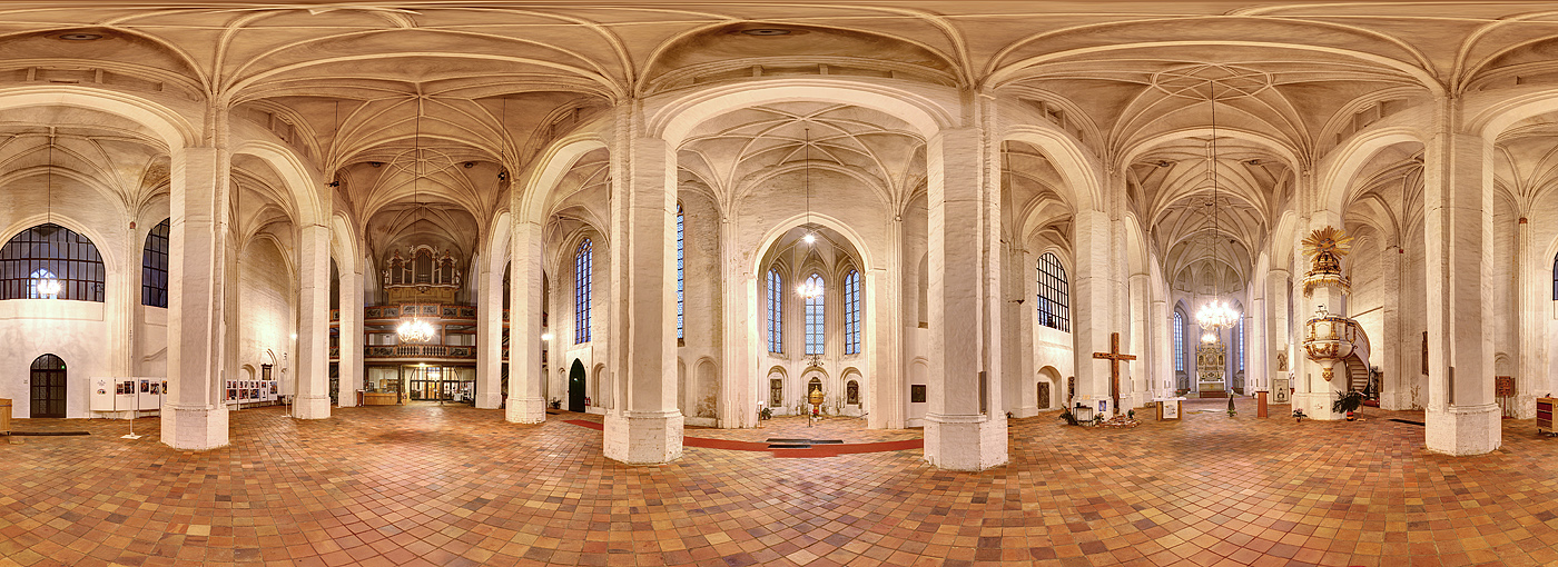 360°-Innenansicht der Oberkirche Sankt Nikolai zu Cottbus